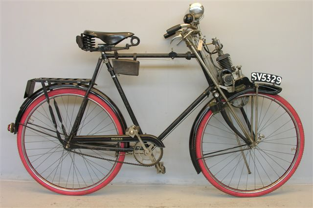 Cyclotracteur cycle 1919